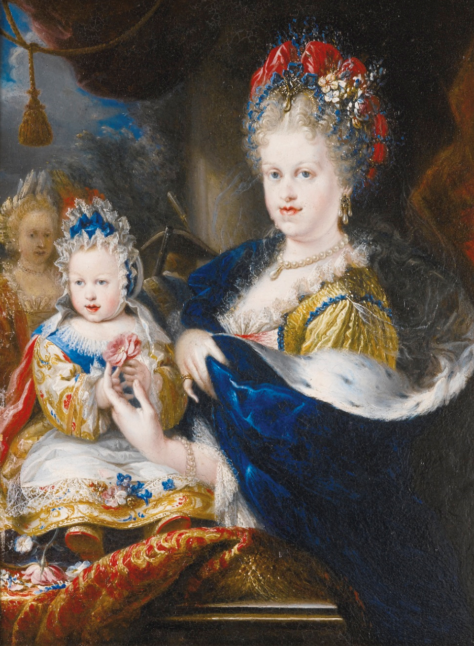 SM LA REINA DE ESPAÑA DOÑA MARÍA LUISA GABRIELA DE SABOYA CON SAR DON LUIS DE BORBÓN, PRÍNCIPE DE ASTURIAS AL FONDO, POSIBLEMENTE ANA MARÍA DE LA TRÉMOILLE, PRINCESA DE LOS URSINOS, SU CAMARERA MAYOR. JACINTO MELÉNDEZ